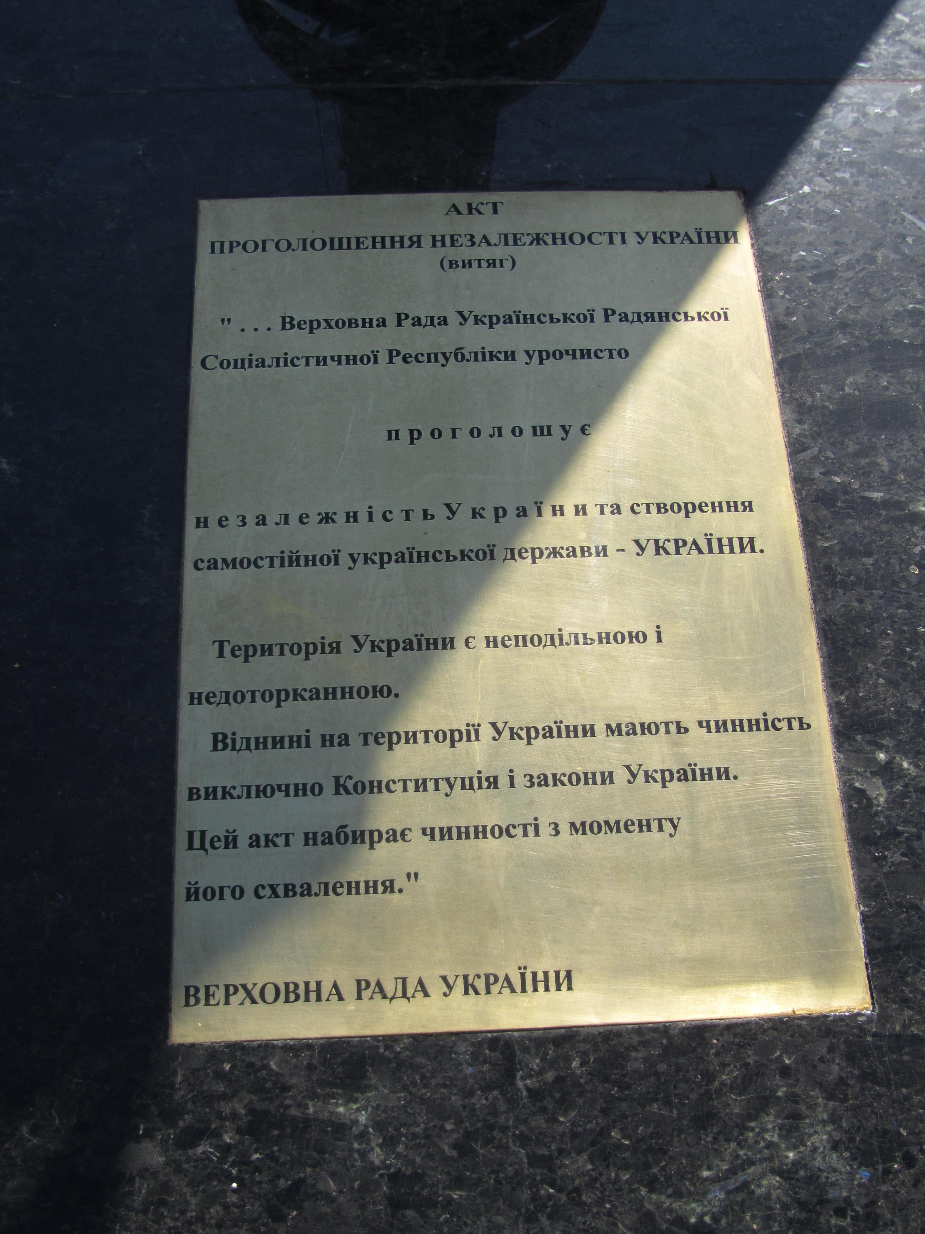 Зміїв, державний прапор України - Акт проголошення Незалежності України